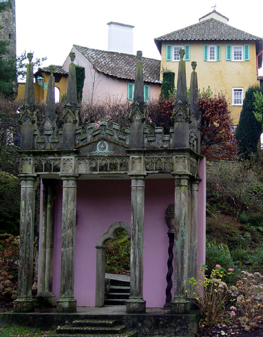 portmeirion